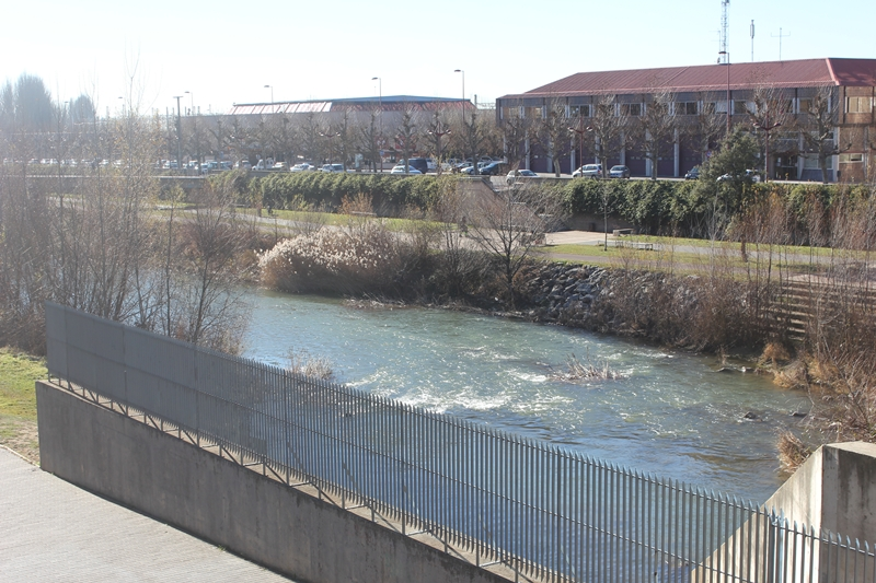 Rio Benesga a su paso por León, al fondo el parque de bomberos y la estación de autobuses